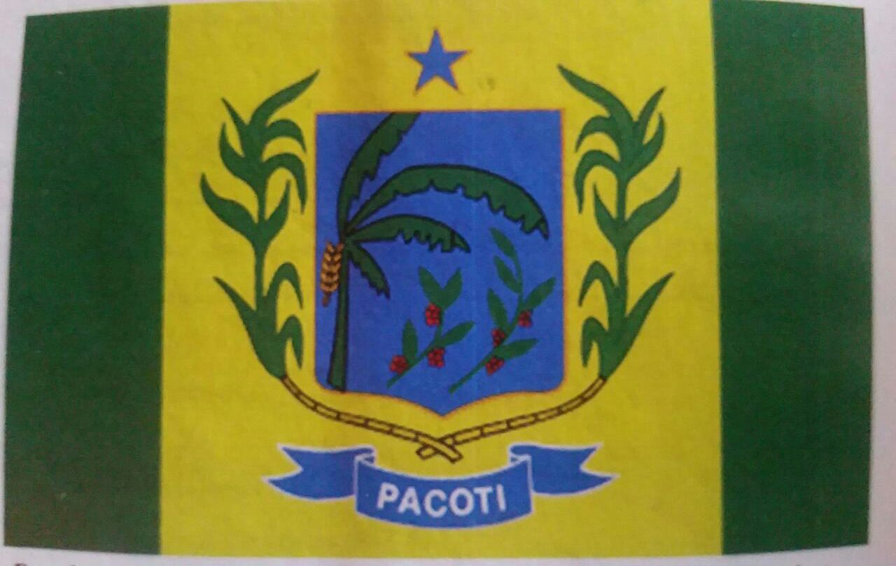 Bandeira do Municipio de Pacoti